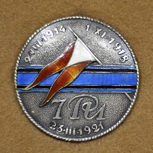 Odznaka 7 puł